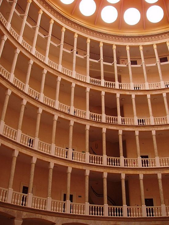 Marek Leykam (1952), Biurowiec Prezydium Rządu (wnętrze) przy ul. Wspólnej 62 w Warszawie